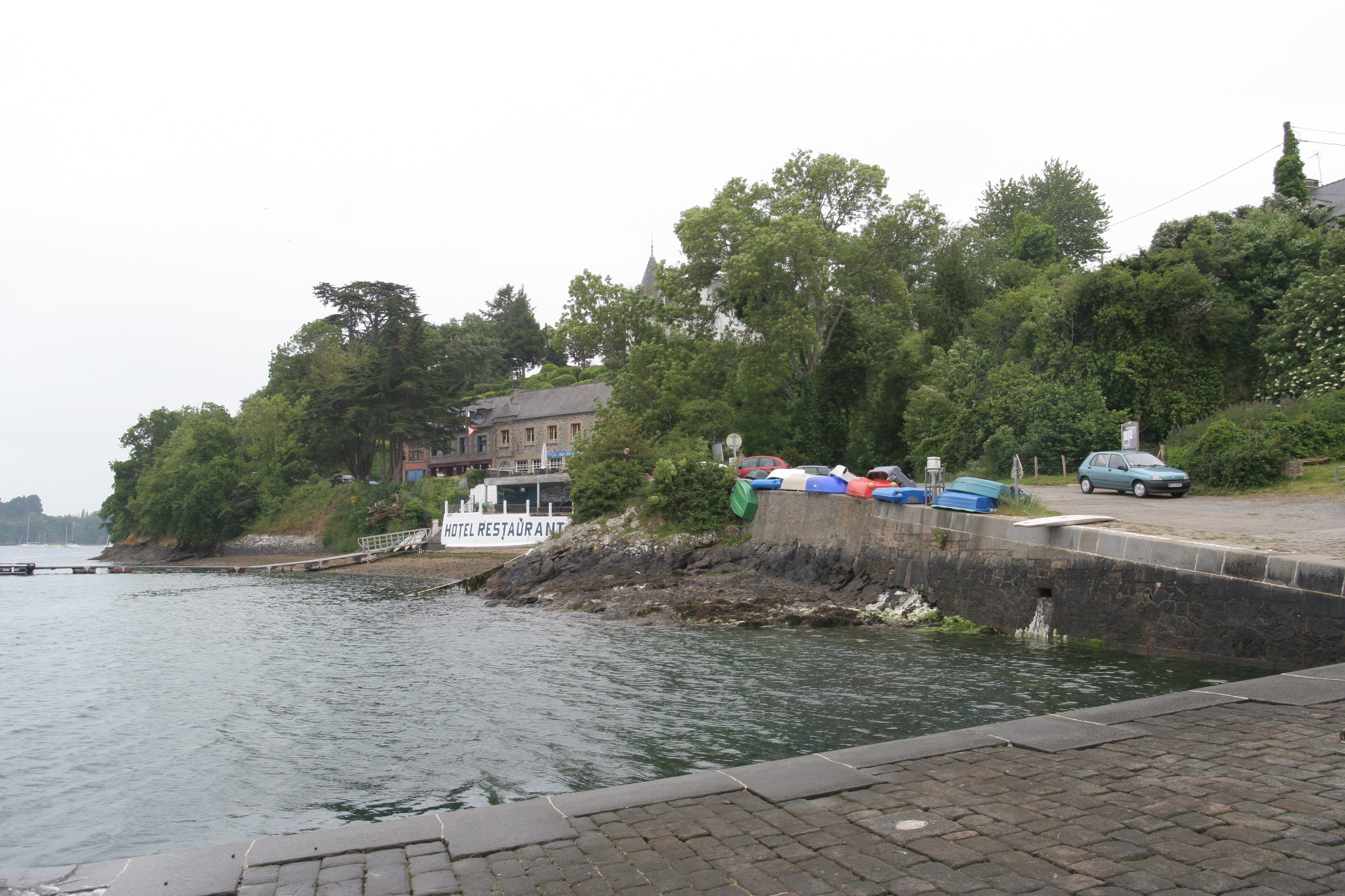 Cale de Jouvente au bord de la Rance à Pleurtuit.